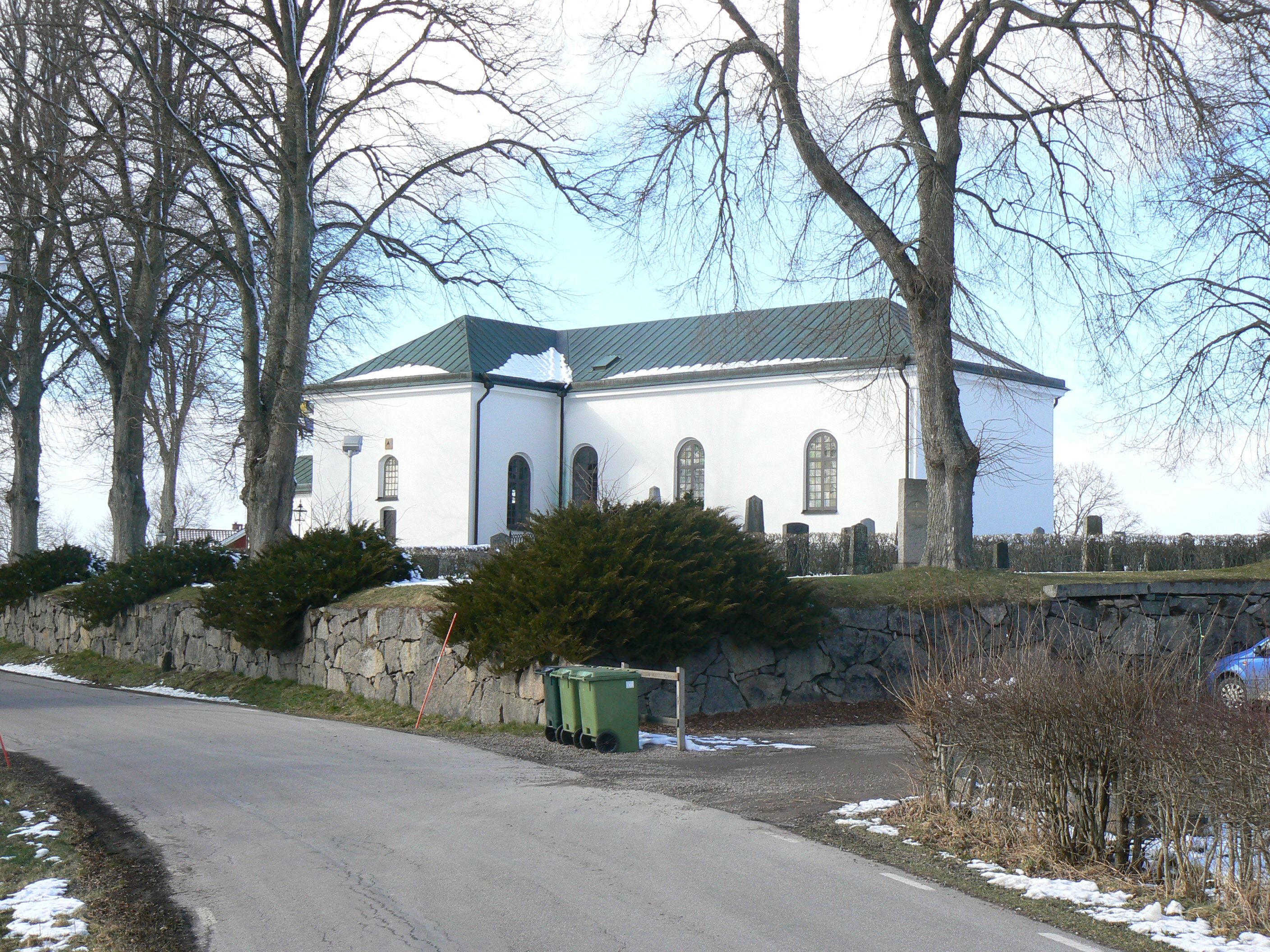 Örtomta church in Östergötland, Sweden.